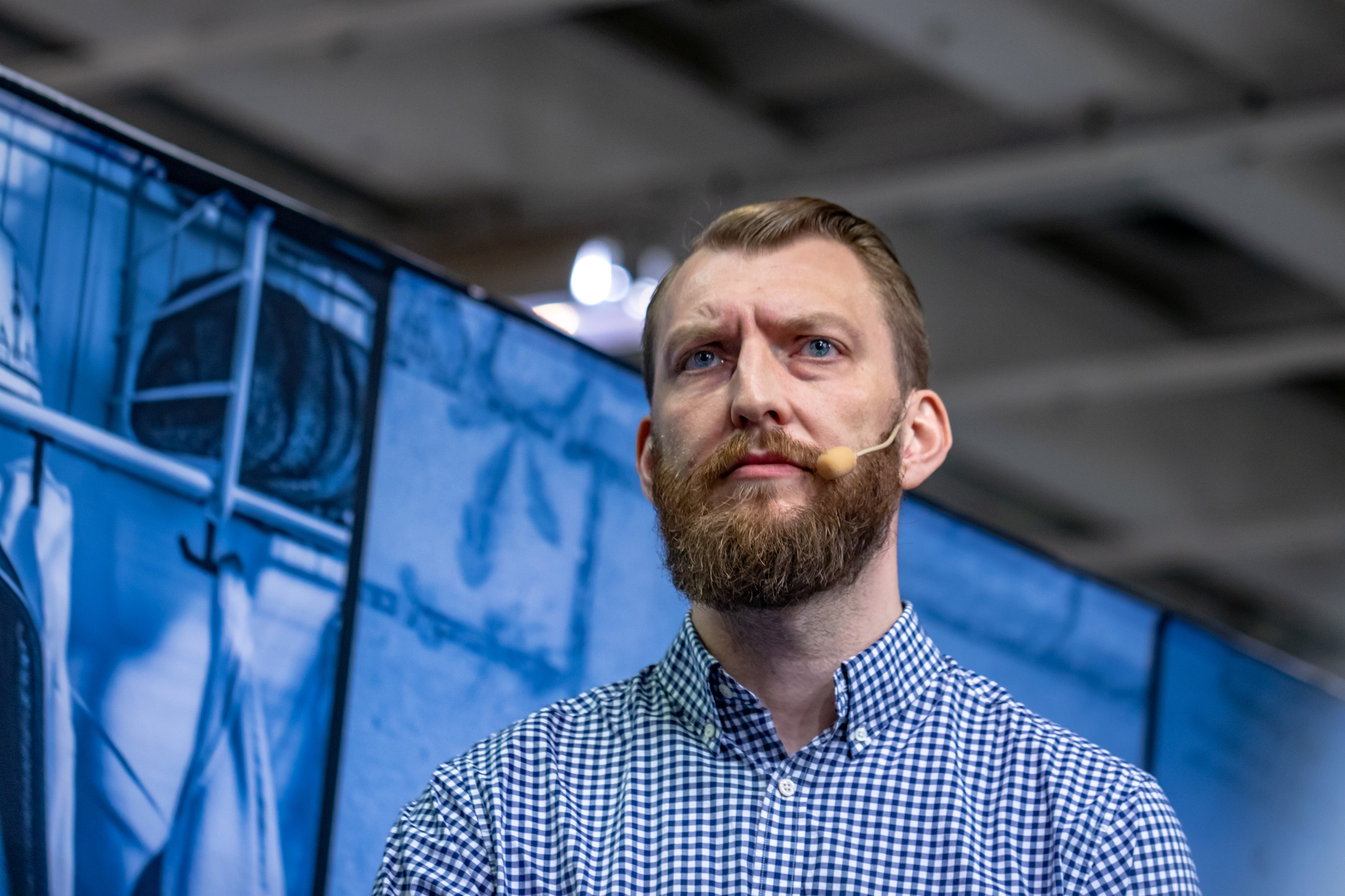 Ivar Arpi, leader writer, Svenska Dagbladet. Gothenburg Book Fair 2018.